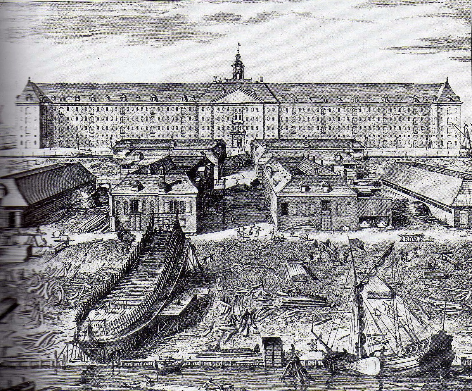 Gravure représentant l'arsenal et le chantier de la VOC à Amsterdam vers 1650